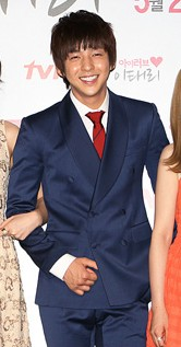 tvN 월화드라마 '아이러브 이태리' 제작발표회